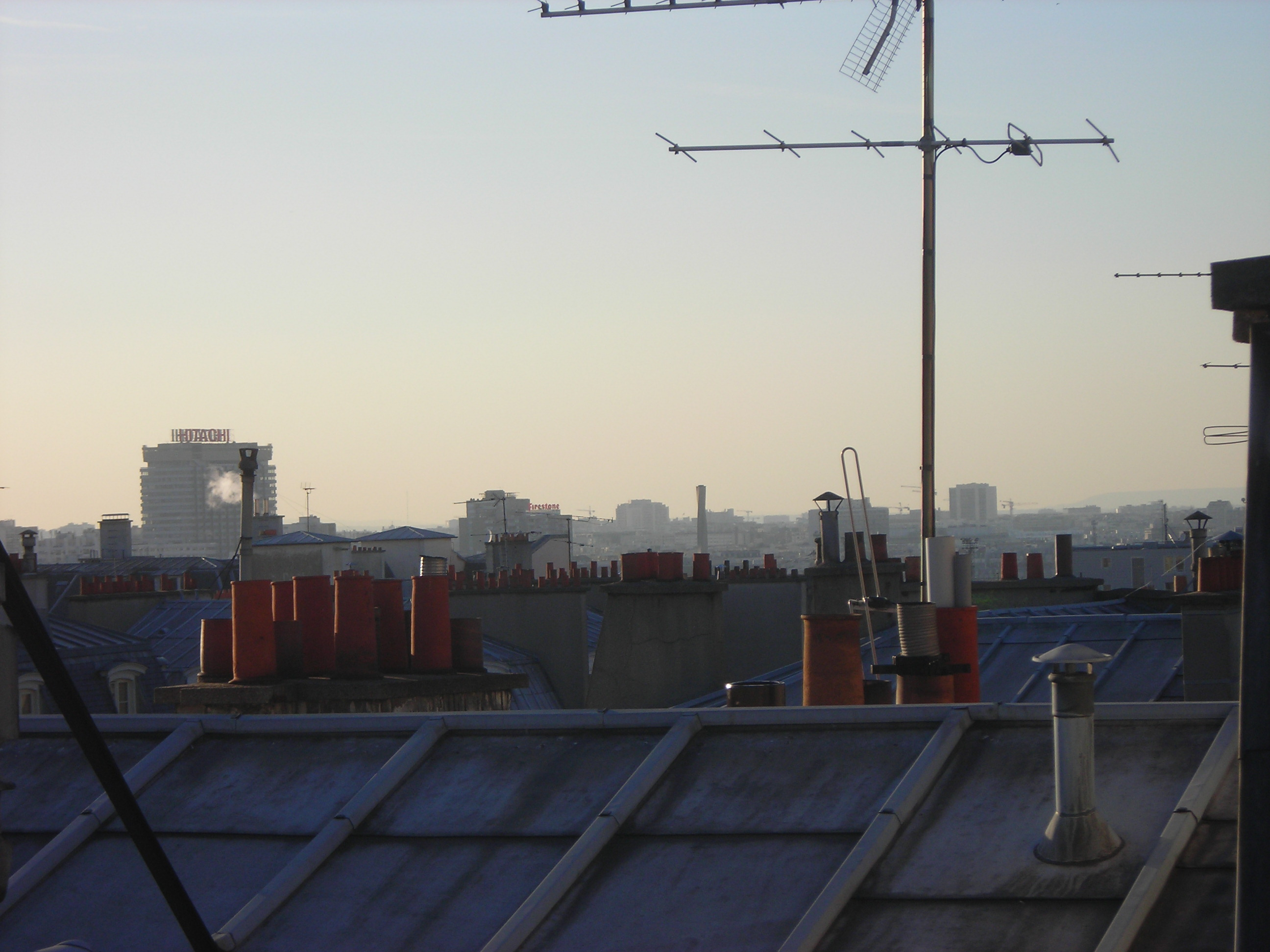 Vue des toits de Paris en direction de la tour de bureaux « Le Courcellor II » (1976), située entre les rues d'Alsace (no 35) et de Lorraine (no 28) à Levallois-Perret, munie de son ancienne enseigne « HITACHI » emblématique — de couleur rouge et bien visible du boulevard périphérique et de la ligne de chemin de fer desservant la gare Saint-Lazare — qui fut déposée en mars 2009. La tour, qui avait alors fait l'objet d'une campagne de désamiantage d'une année a été restructurée à partir de 2009, avant d'être rebaptisée « Tour SoOuest » (R+24, 85 m de hauteur) [1].